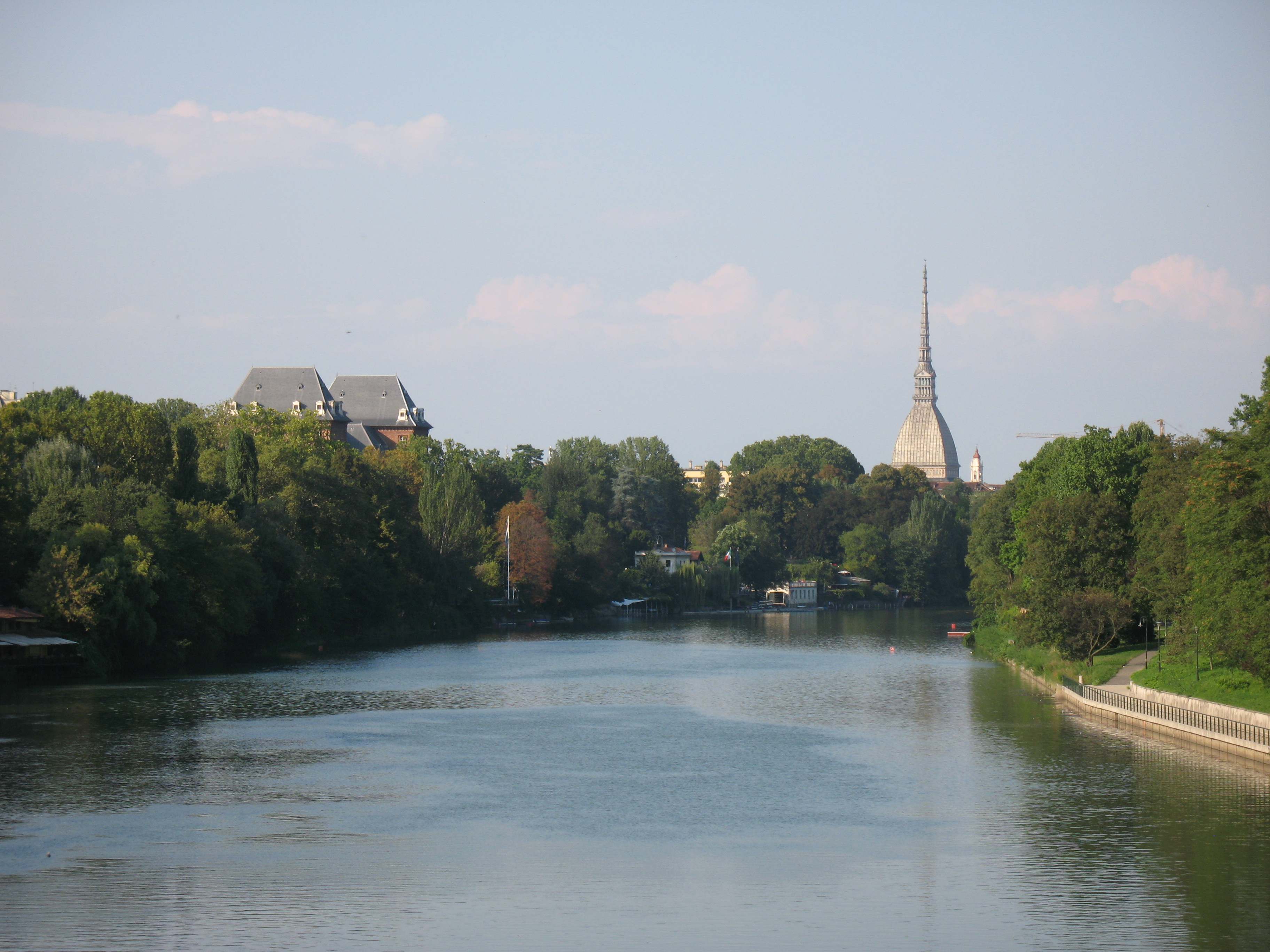 Vista del Po dal Ponte Isabella, Torino, Italia. Sullo sfondo la Mole Antonelliana e la parte posteriore del Castello del Valentino